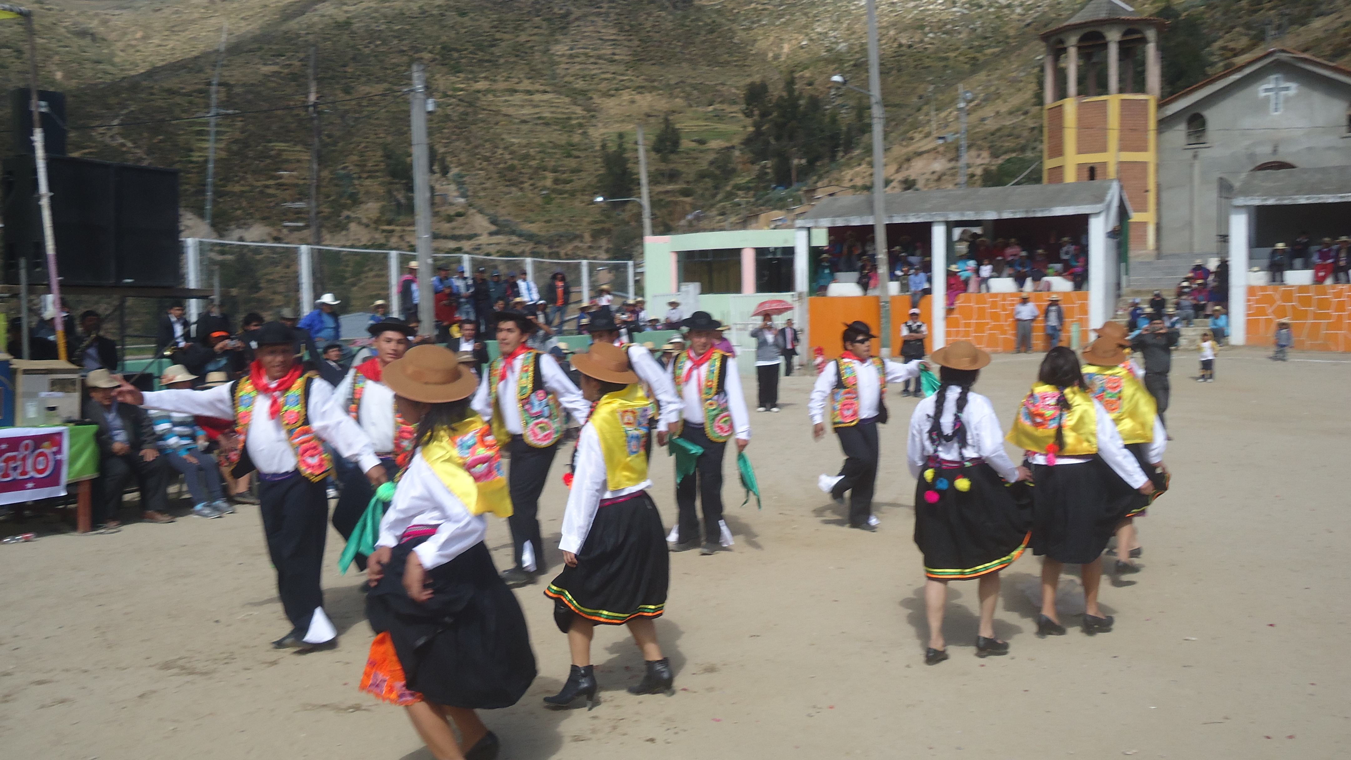 Danza por aniversario del distrito